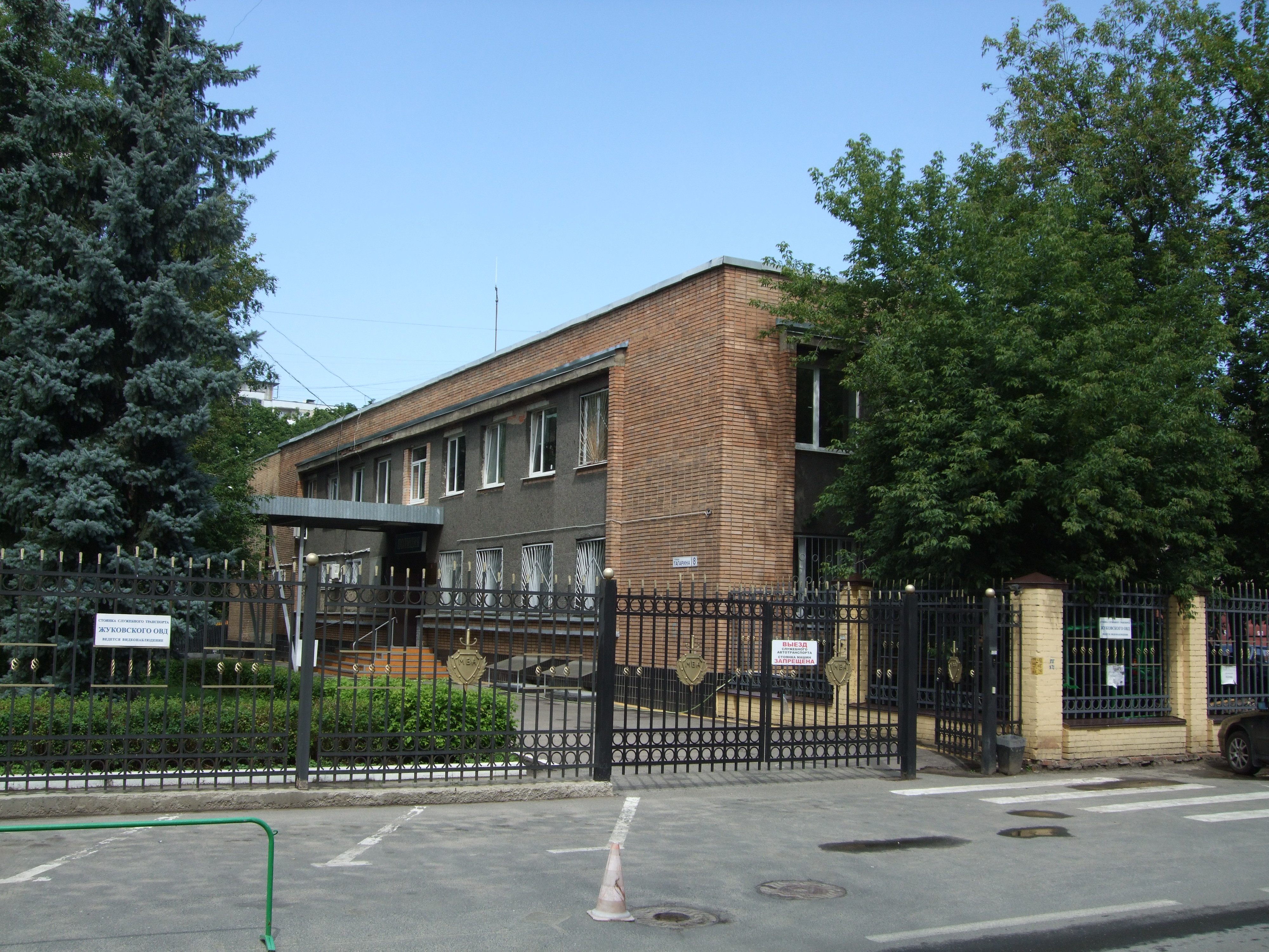 Россия, город Жуковский, на углу улиц Гагарина и Энергетическая. Отдел внутренних дел по городскому округу Жуковский (полиция): основное здание